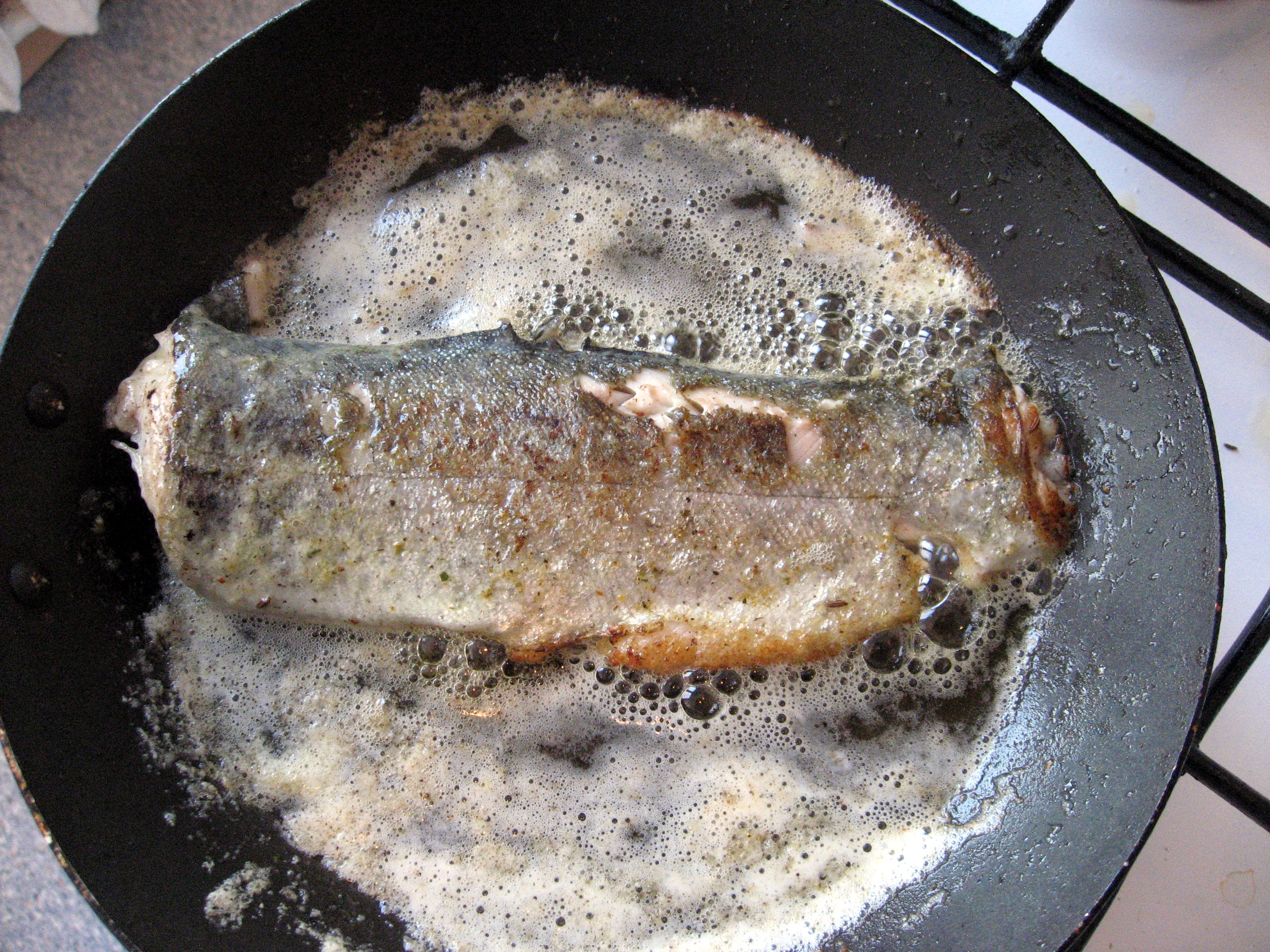 Pstruh duhový smažený na másle